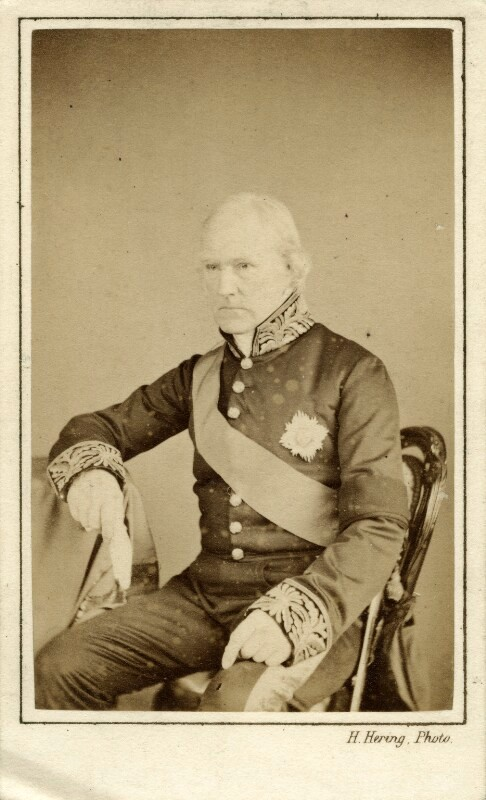 Photograph by Henry Hering